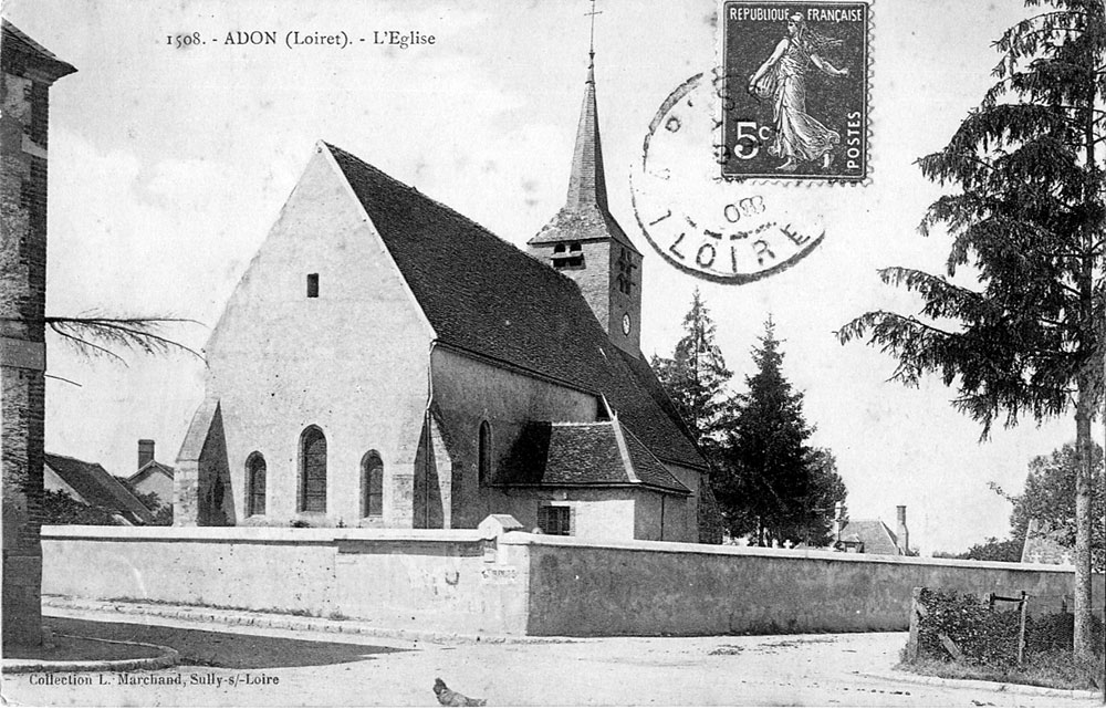 L'église, Adon, Loiret, France